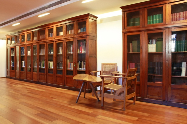 Interior de la biblioteca del Museo Arqueológico de Asturias.